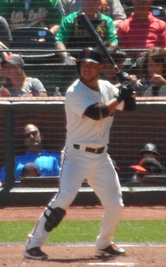 Gregor Blanco